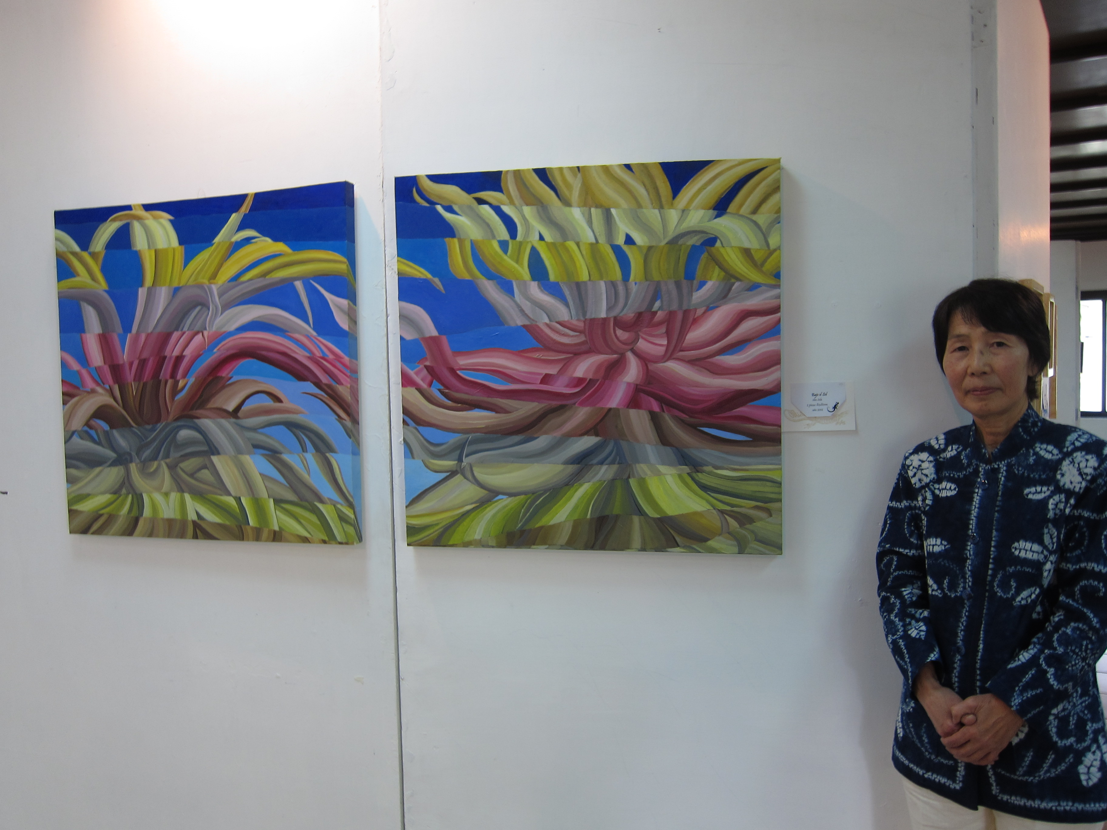 Midori Suzuki, en su expo de arte en la Asociación México Japonesa AC. de la Ciudad de México.